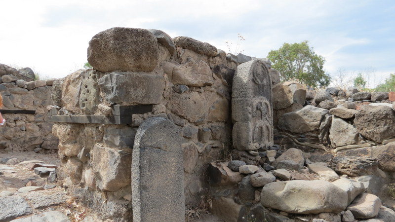 Bethsaida - Beit Saida, תל בית צידה